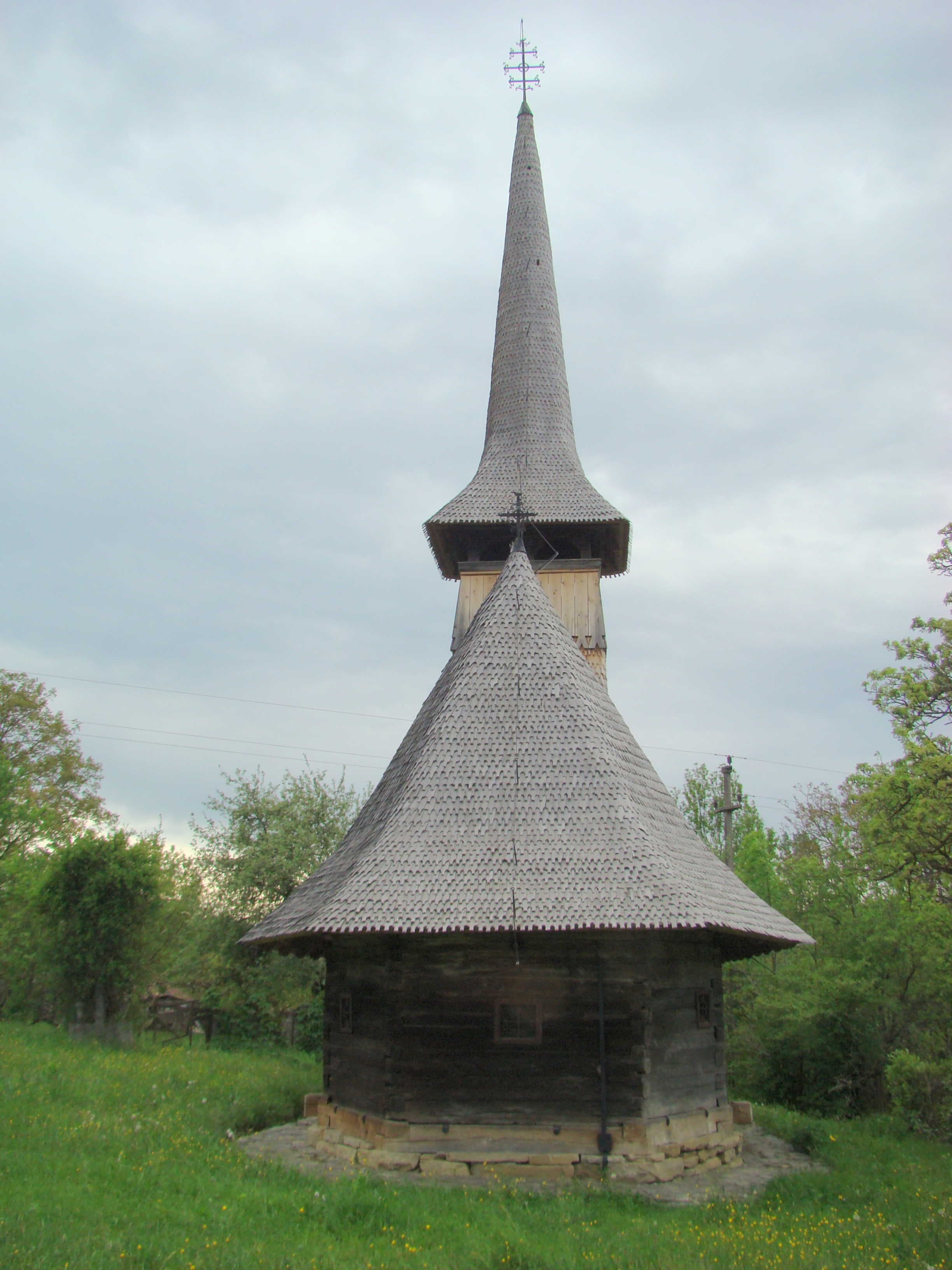 Biserica de lemn din Toplița, comuna Letca, judeţul Sălaj